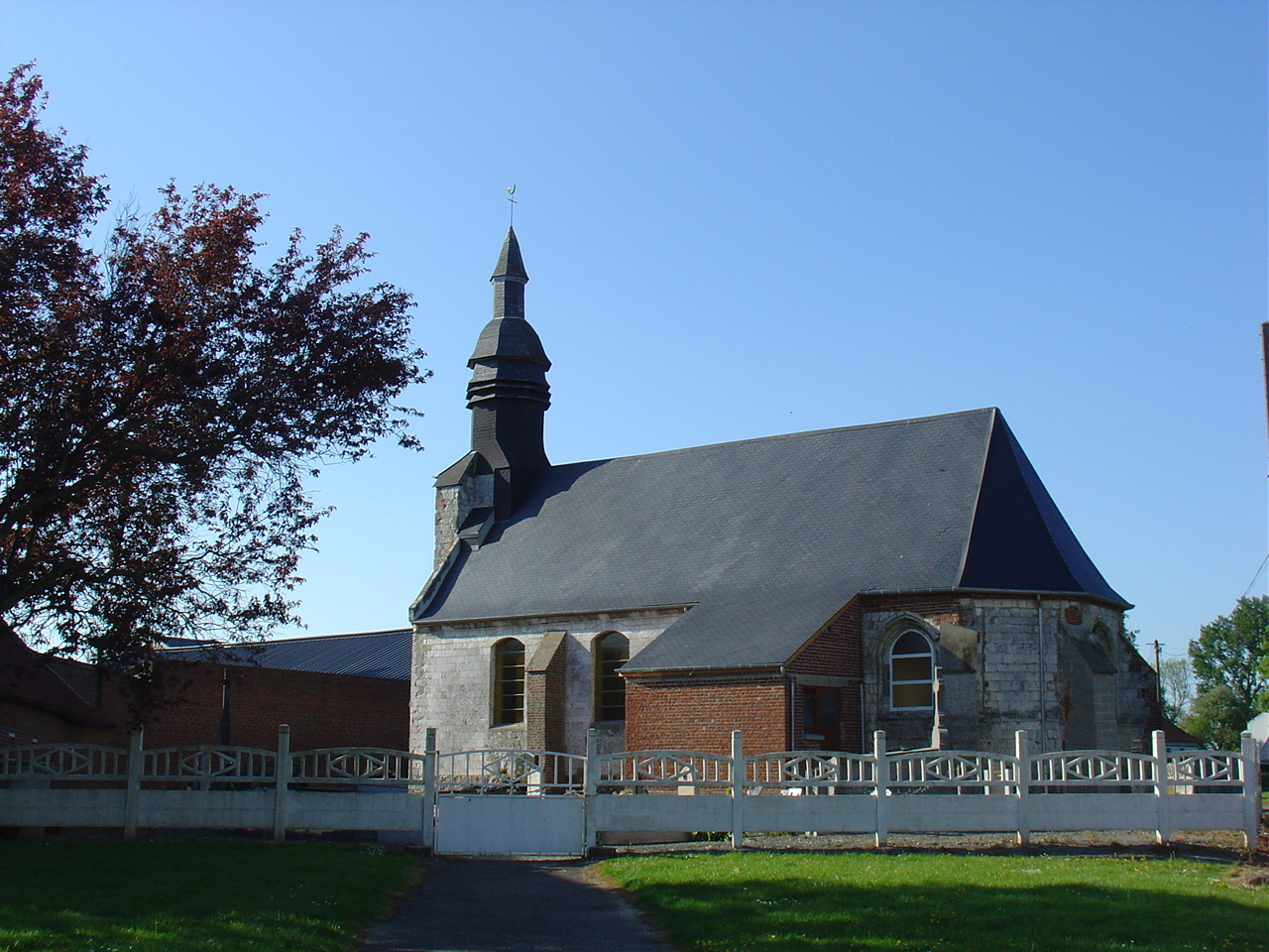 Église d'Ecoivres